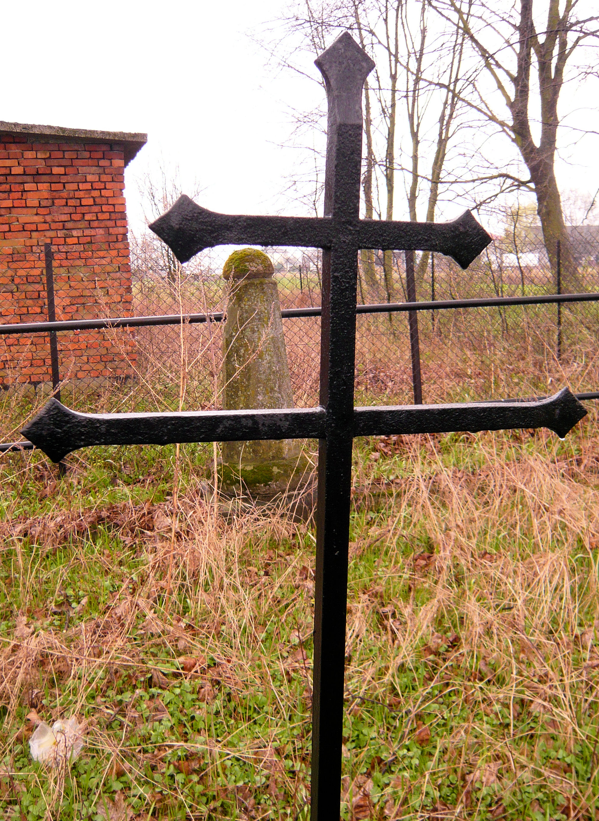 Cmentarz wojenny 317 Bogucice IX okręg Bochnia